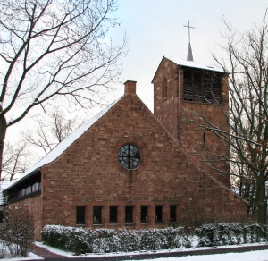 Gnadenkirche in Mannheim-Gartenstadt